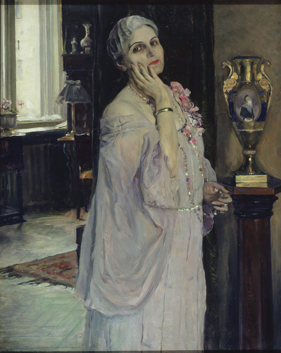 Портрет народной артистки РСФСР К.Г. Держинской. 1937 г. Государственная Третьяковская галерея